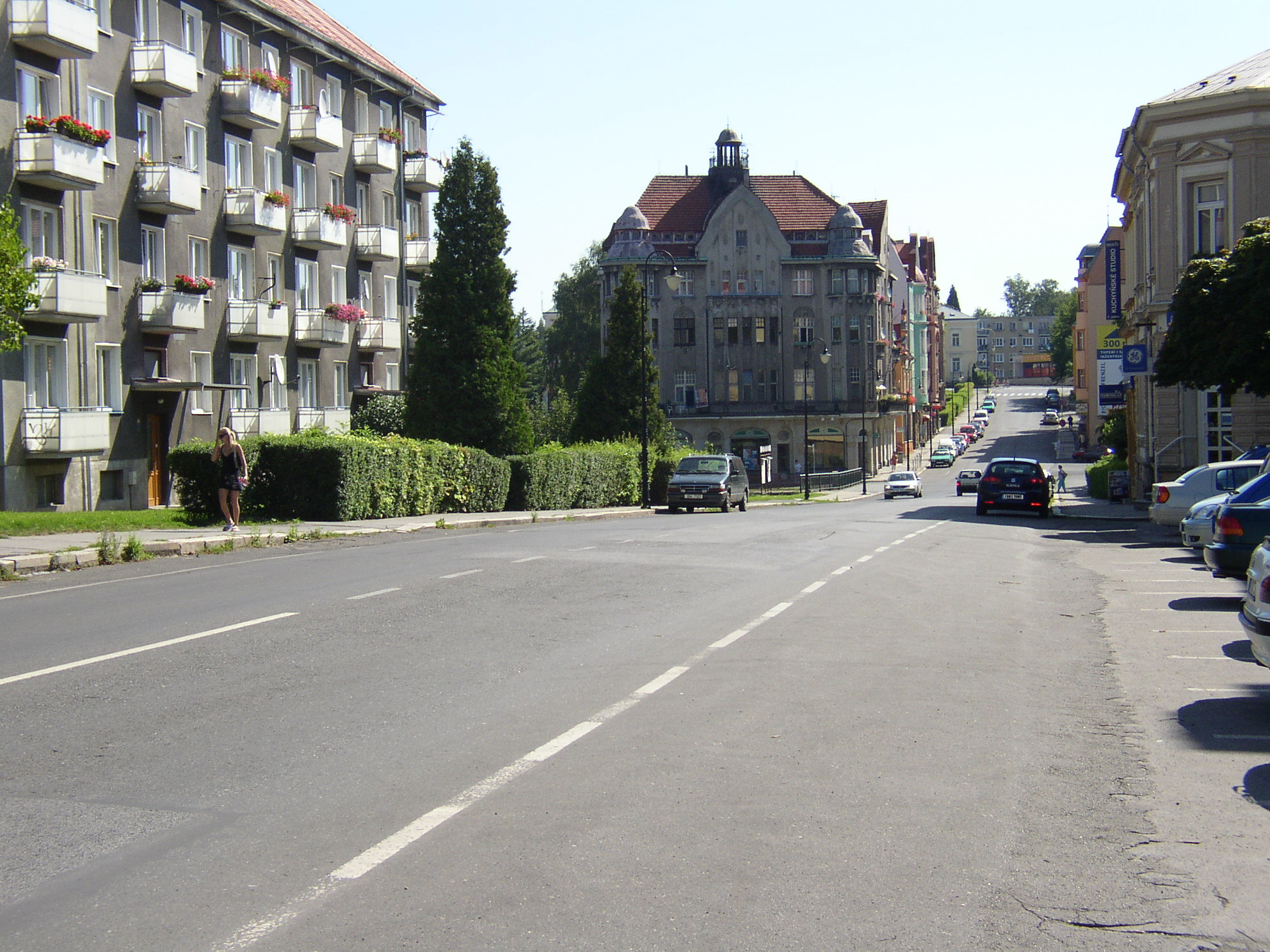 Varnsdorf, ulice Legií